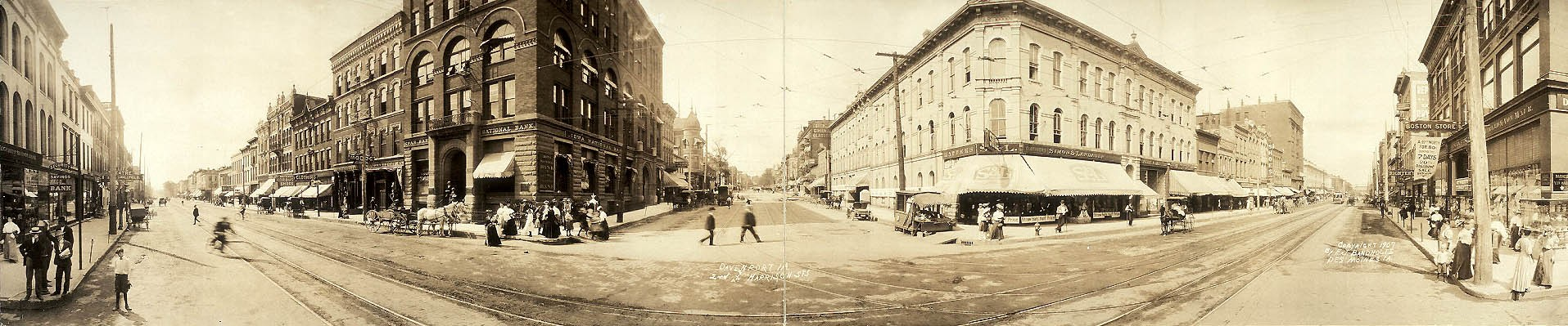 "1907. Davenport, IA, 2nd & Harrison Sts.. F. J. Bandholtz".